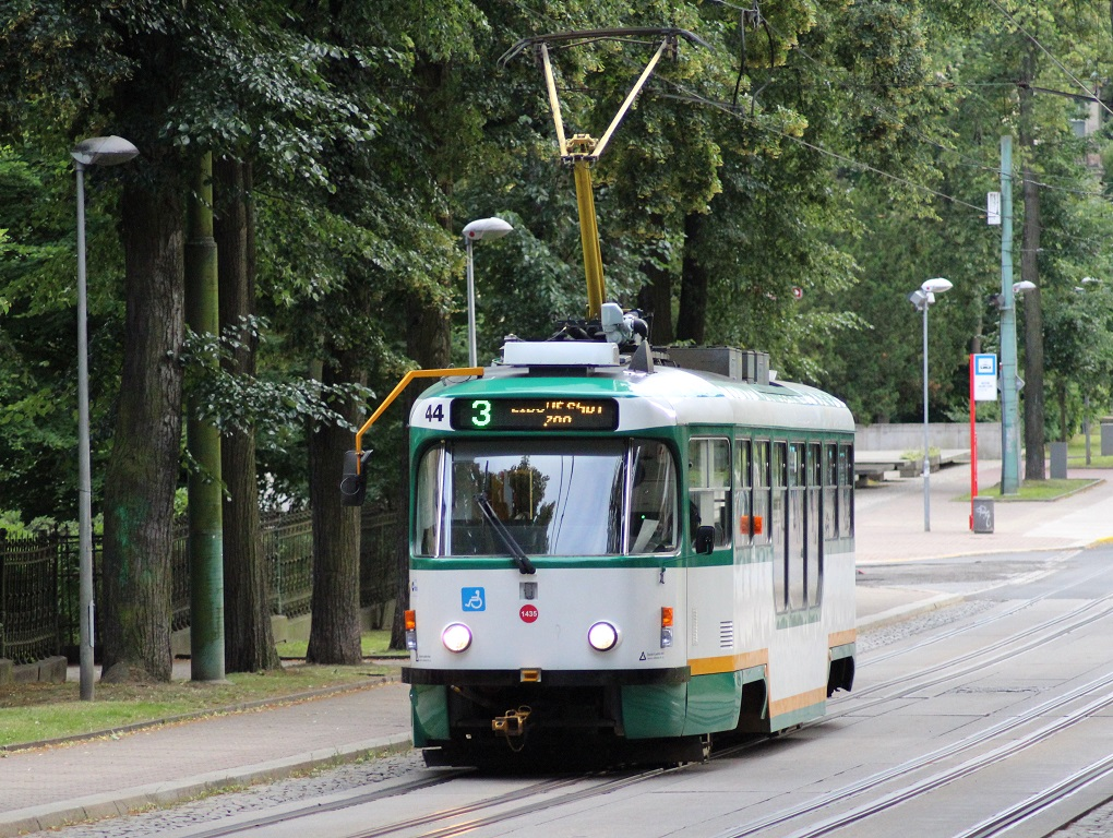 Tatra T3R.SLF evidenčního čísla 44 v Liberci na Masarykově třídě